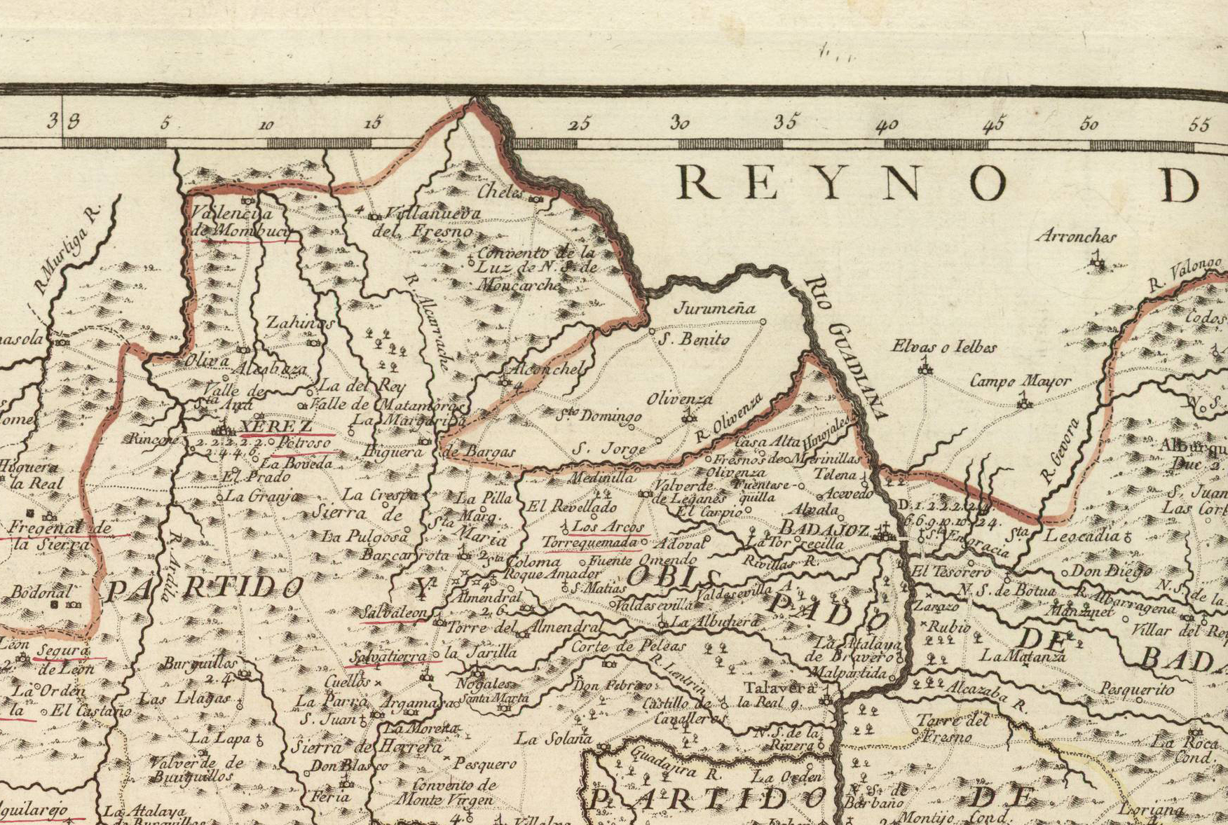 Situação geográfica da comarca de Olivença no Mapa de la provincia de Estremadura (año 1766).